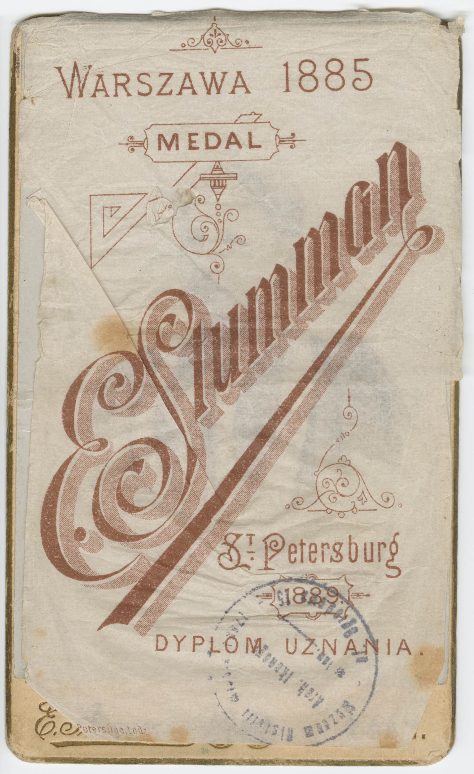 Fotografia portretowa wykonana w atelier zakładu fotograficznego "E. Stumman" przedstawia młodą dziewczynę w stroju wizytowym z gładko zaczesanymi włosami. Zdjęcie zostało wykonane na jasnym tle. Zakład fotograficzny “E. Stumman” funkcjonował już w 1856 roku prawdopodobnie w Warszawie. W Łodzi działalność podjął w 1871 roku. Do 1887 roku zakład mieścił się przy ulicy Piotrkowskiej 24. Następnie, gdy w 1887 roku Antoni Jezierski postanowił wybudować murowaną piętrową oficynę mieszkalną z pomieszczeniem dla zakładu fotograficznego, na posesji pod adresem Piotrkowska 20, Eliasz Stumman skorzystał z nadarzającej się możliwości i przeniósł tam swój zakład. Kolejna zmiana adresu nastąpiła na początku XX wieku, kiedy to w centralnej części podwórka przy Piotrkowskiej 17, wystawiono jednopiętrowy budynek, z przeznaczeniem na zakład fotograficzny. Nowe atelier nie służyło Eliaszowi Stummanowi, który zmarł w 1903 r. Obecnie po dawnym atelier pozostały jedynie fundamenty, tworzące dzisiaj obrys budynku, dobrze widoczny z lotu ptaka. Eliasz Stumman fotografował łódzkie pałace, budynki fabryczne czy park Helenowski. Z jego zdjęć powstał album „Łódź-Lodz” wydany w Dreźnie w 1888 roku.